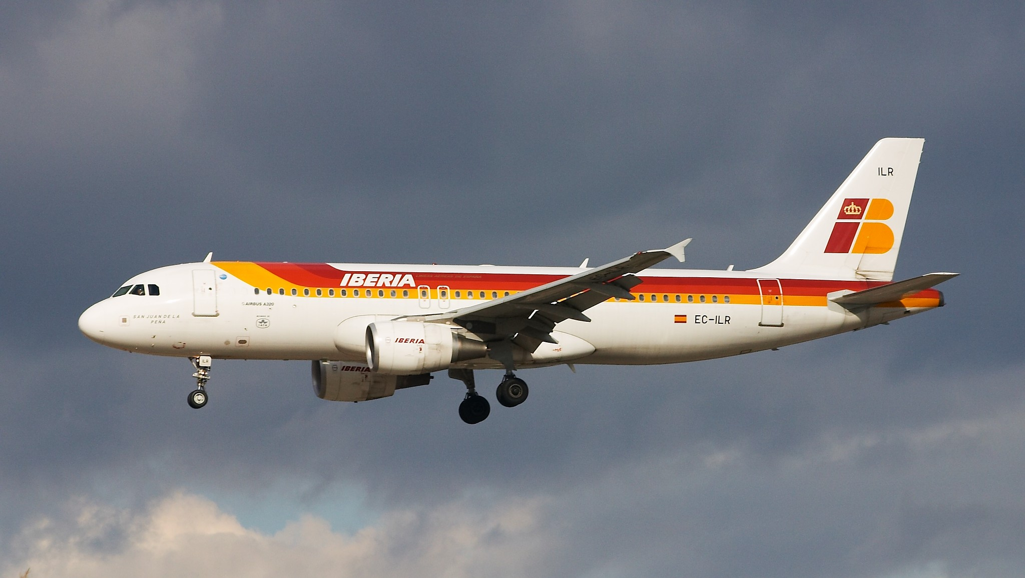 Airbus A320-214 de Iberia a punto de aterrizar en la pista 33 del aeropuerto de Madrid Barajas.